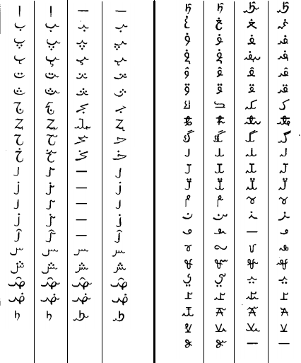 Алфавит Ш. Ногмы на арабской основе (1825 г.)